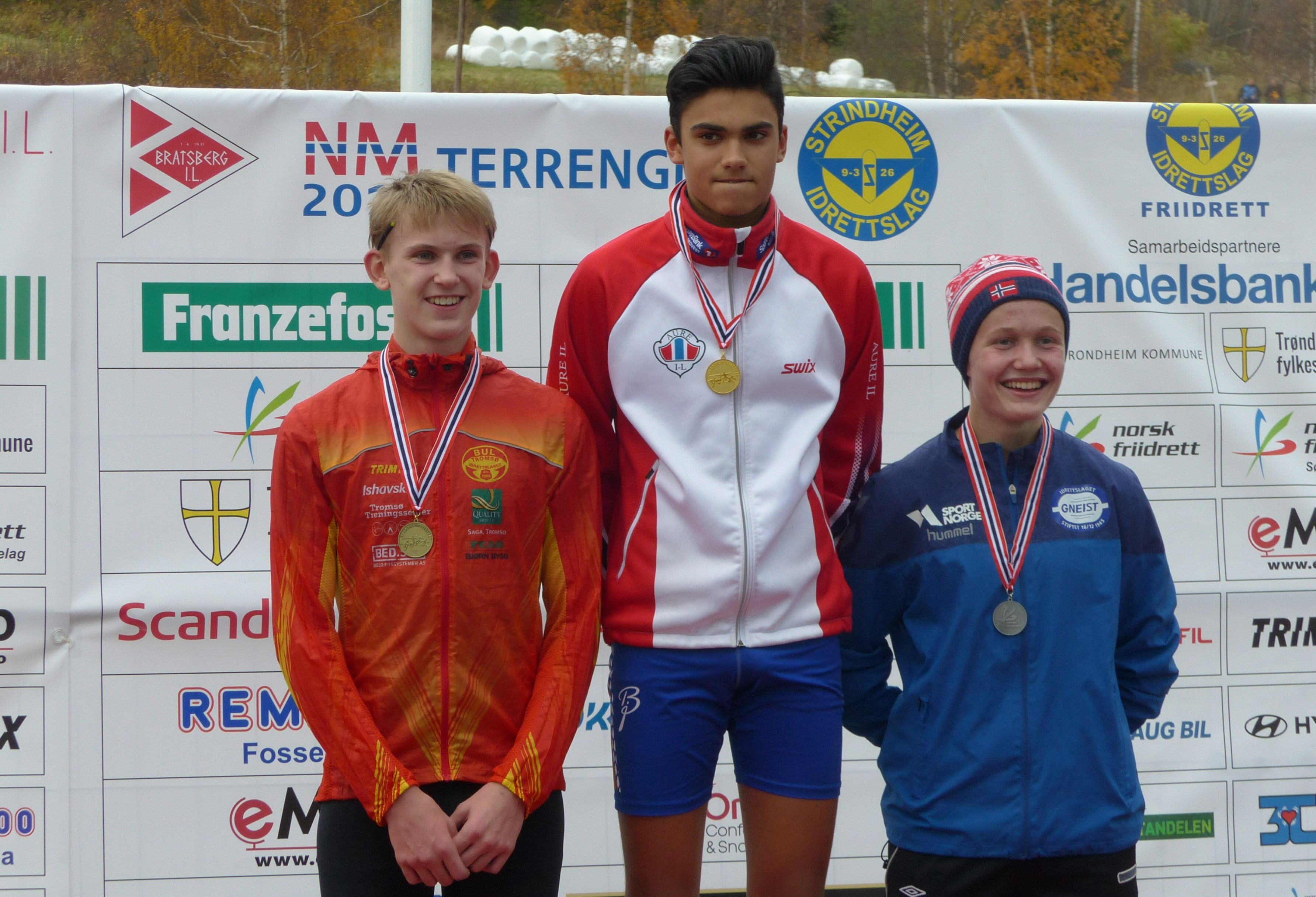 NM i terrengløp, lang løype, Bratsberg - Trondheim, 2018. Seierspallen for klassen G16.